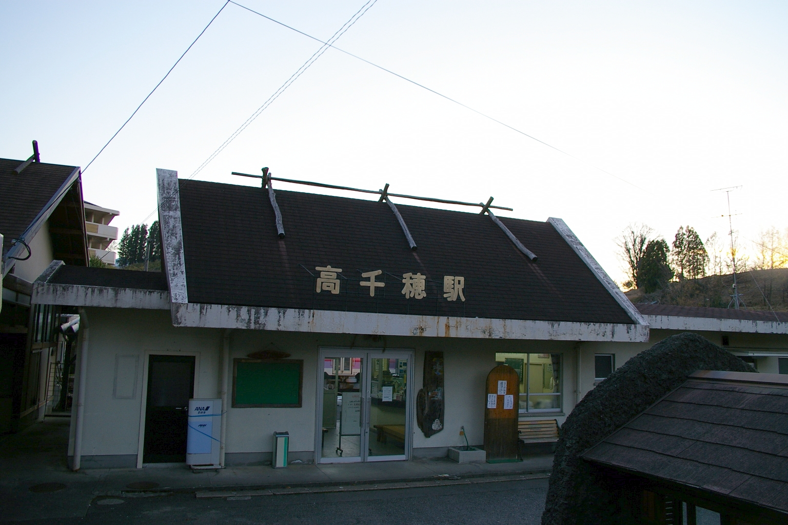 Takachiho Station in Miyazaki, Japan